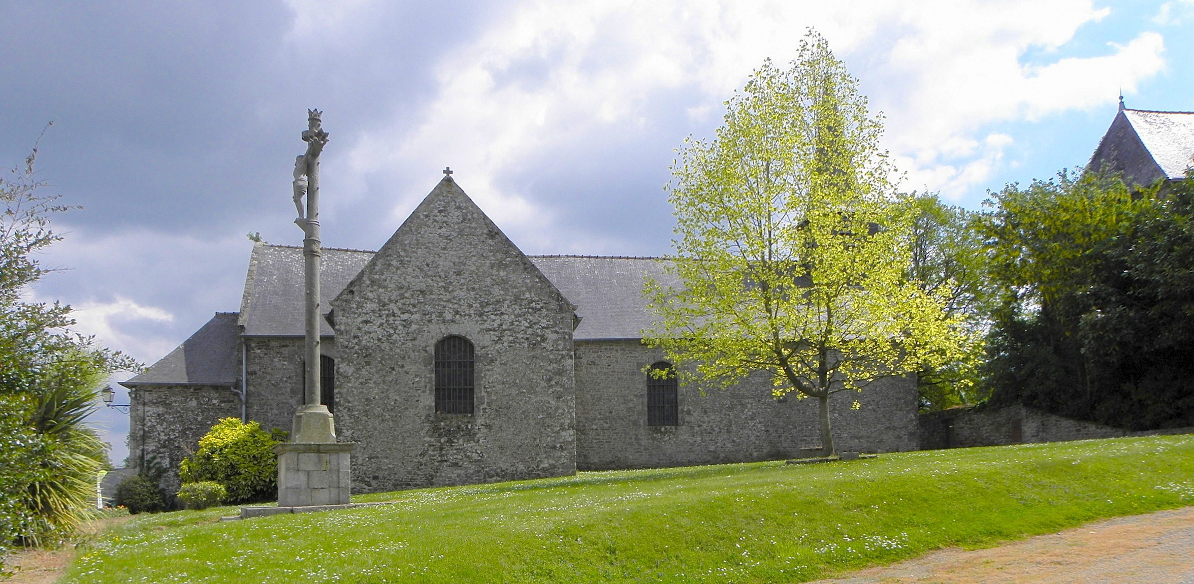 Église Saint-Hubert de Calorguen (22). Flanc nord.